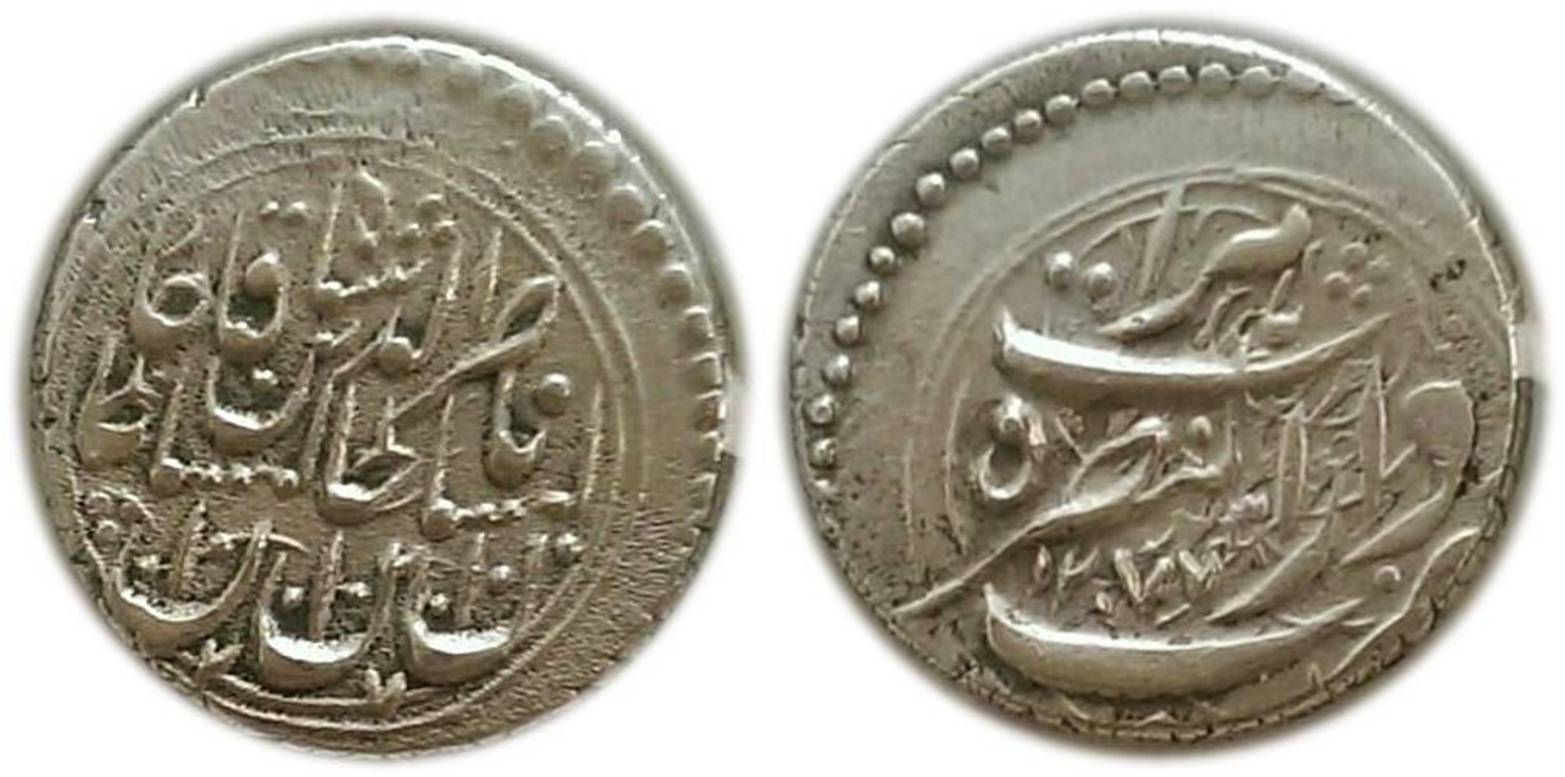 سکه یک قران ناصرالدین شاه قاجار ضرب هرات